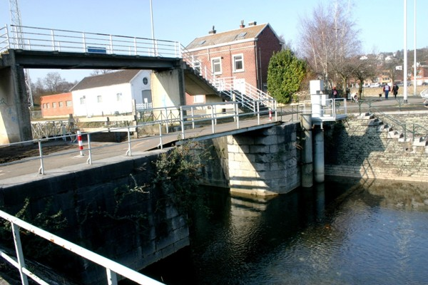 Schleis N° 2: Iewescht Afahrt an de Schleisekanal zu Chênée.